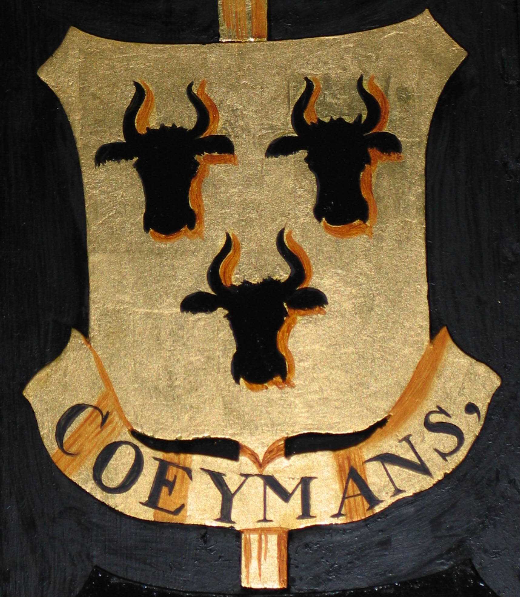 Familiewapen Coymans op het rouwbord van Anna Apollonia Loten in de NH kerk te Beverwijk.